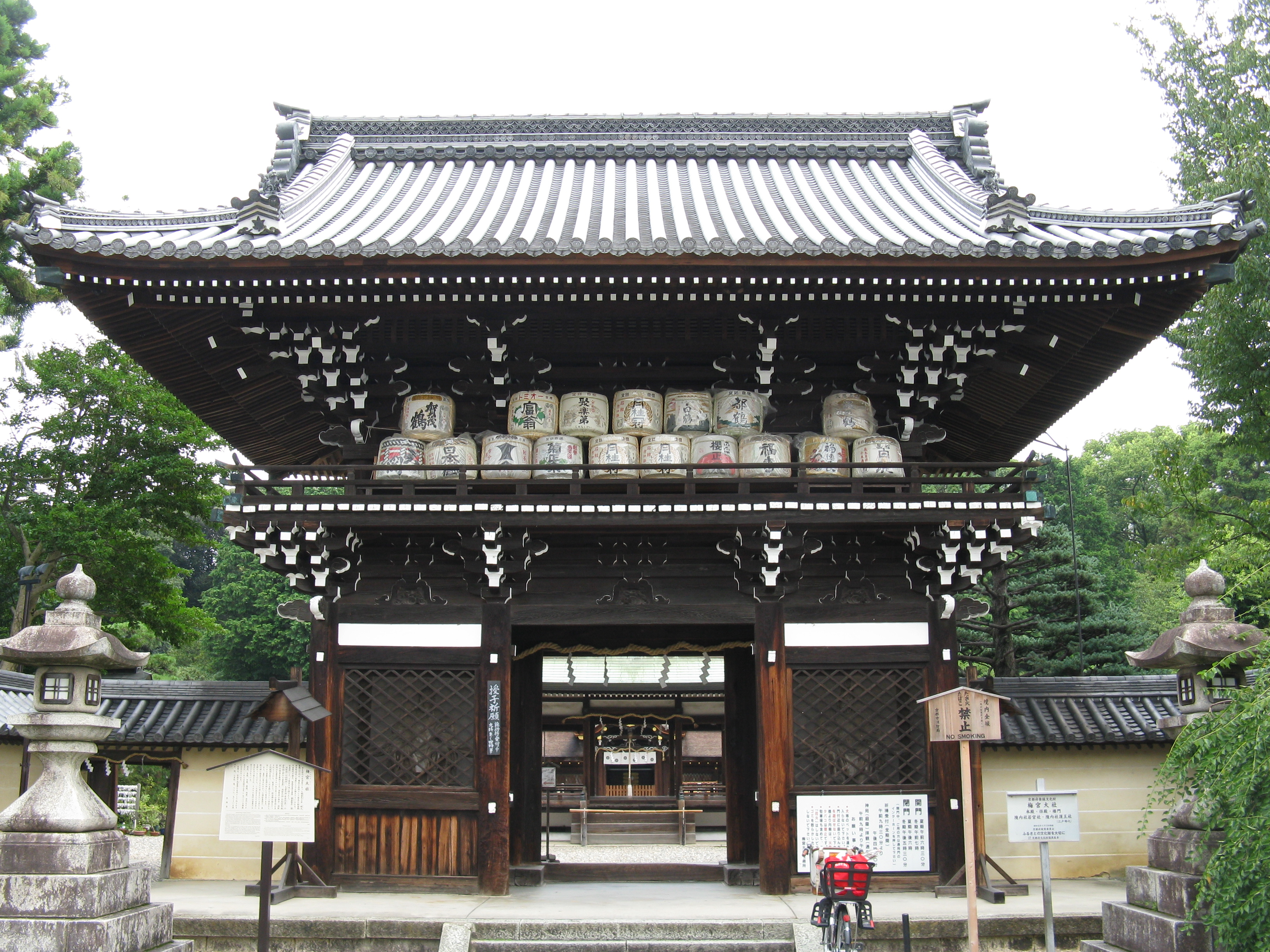 梅宮大社 楼門